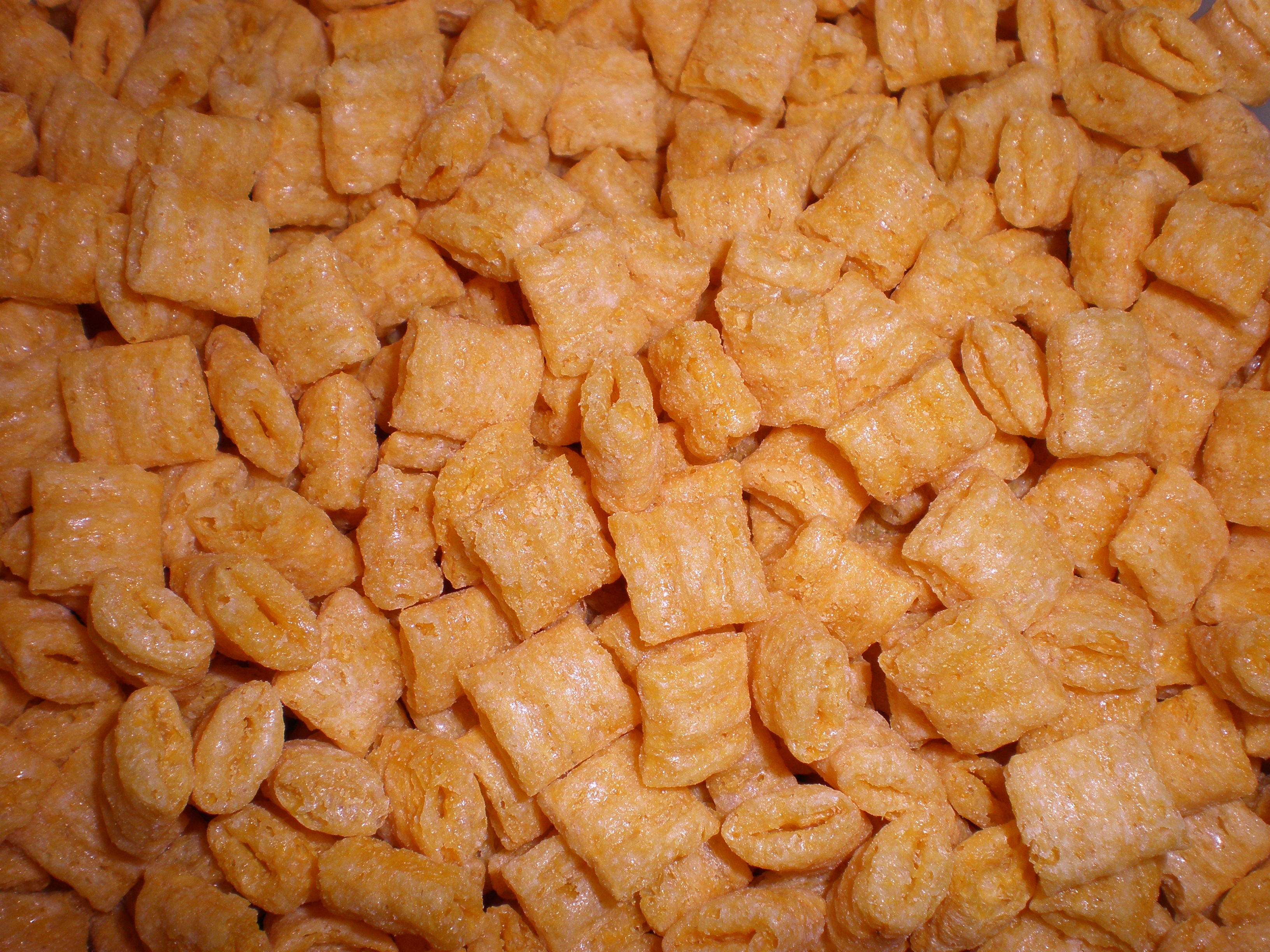 Cap'n Crunch regular flavor cereal